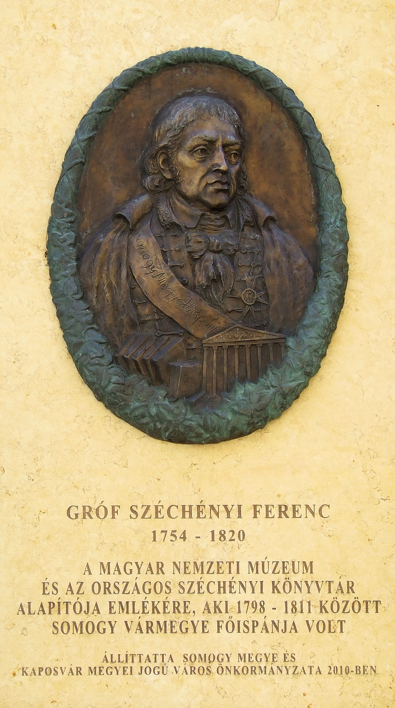 Széchényi Ferenc-emléktábla a kaposvári Rippl-Rónai Múzeum külső falán. Gera Katalin alkotása (2010)